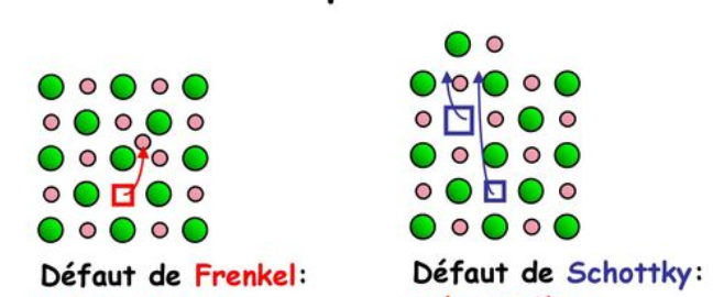 différence entre défaut de frenkel et de schottky